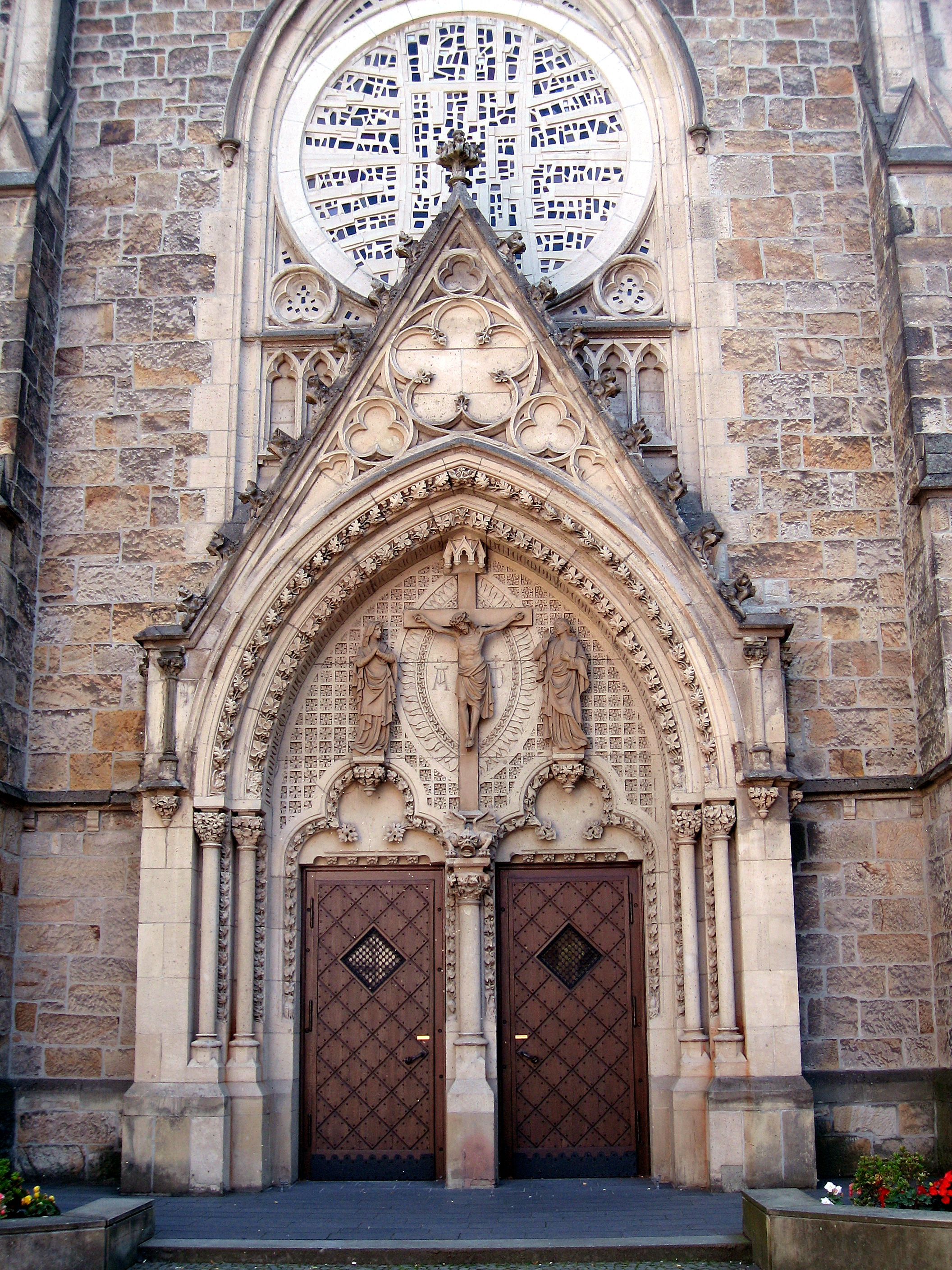 Dortmund, Innenstadt-Ost, Franziskanerkirche, Hauptportal, Westfassade